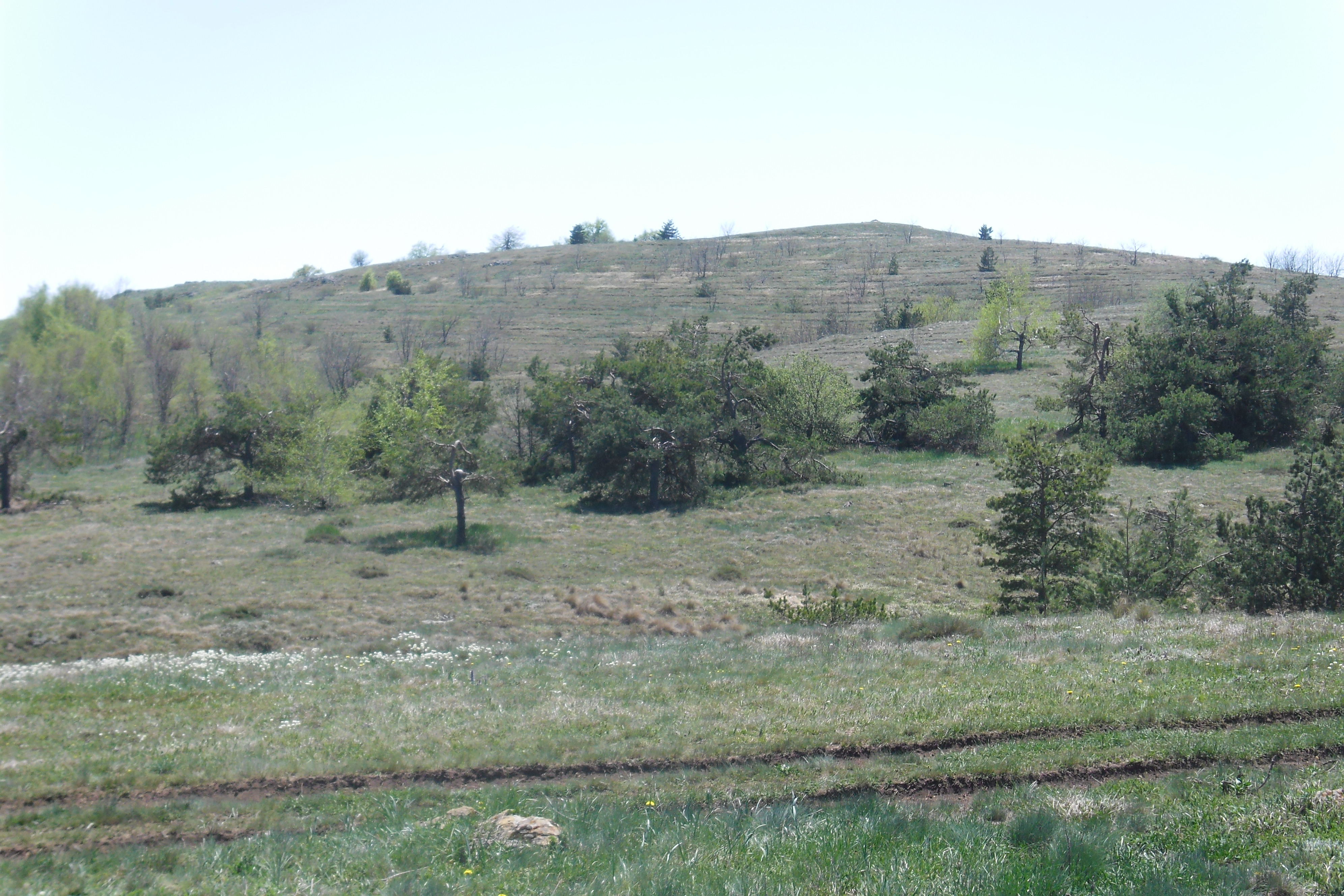 Фото